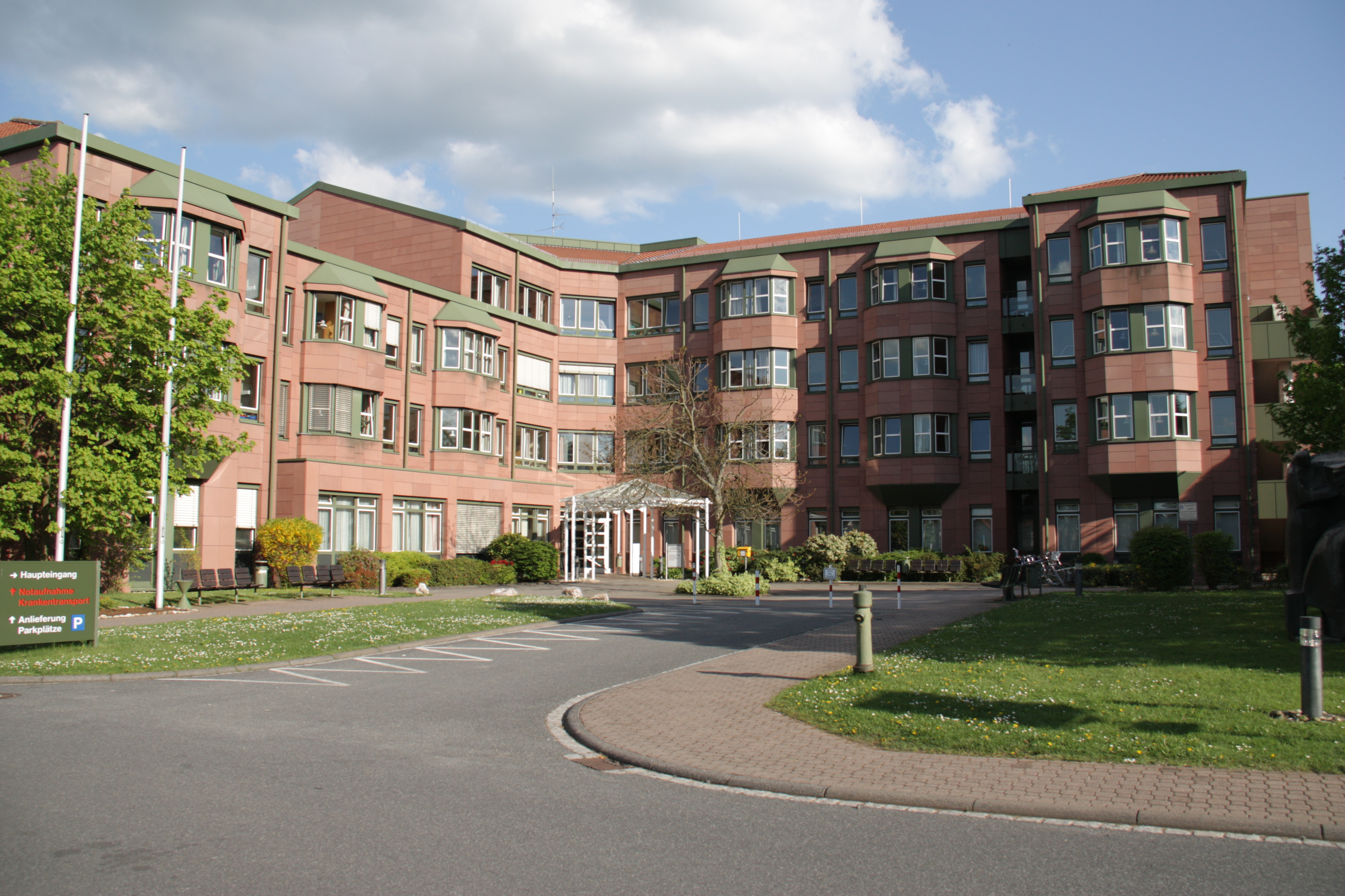 Das Kreiskrankenhaus im Alzenauer Stadtteil Wasserlos